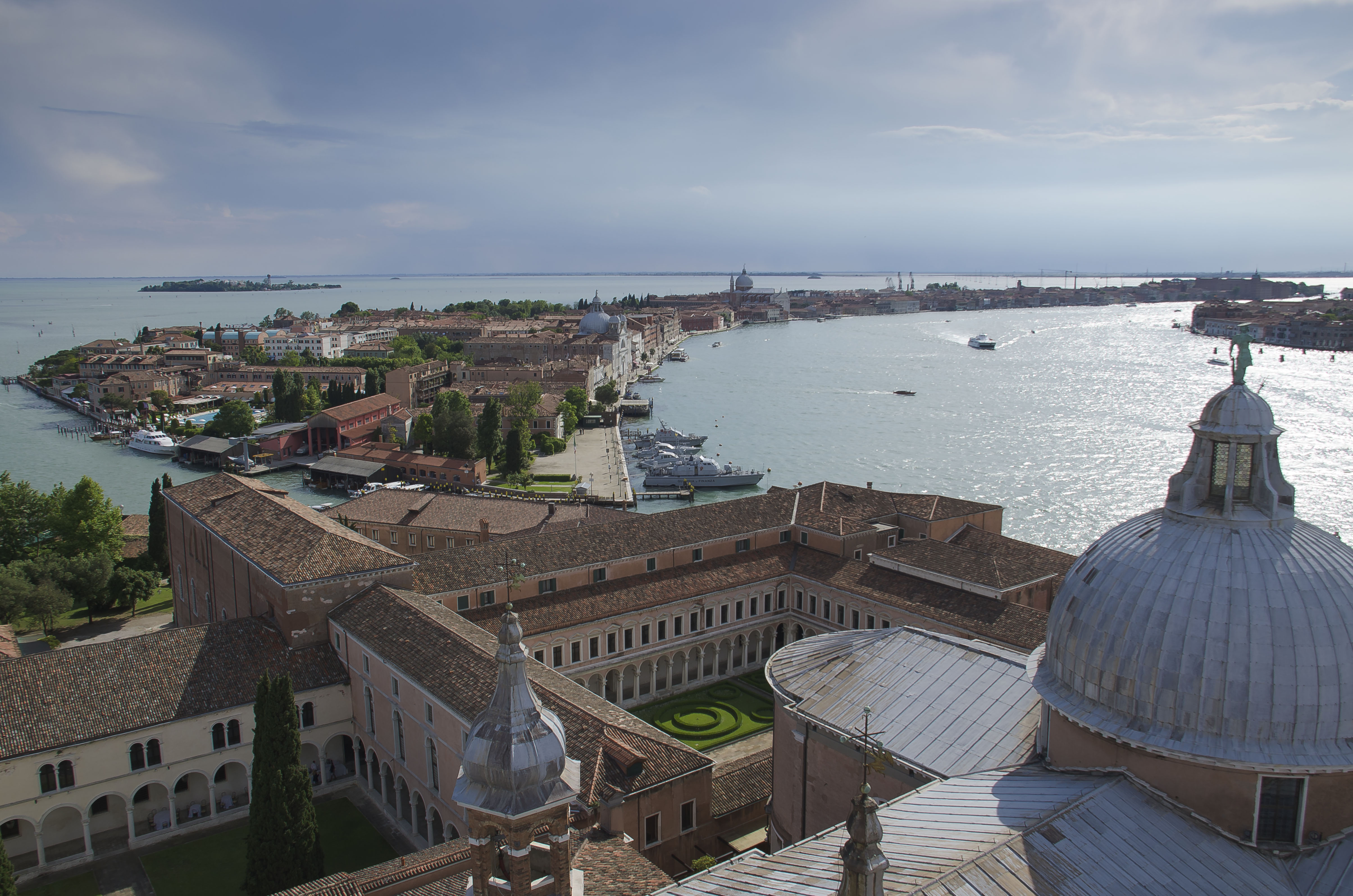 Giudecca, Venezia